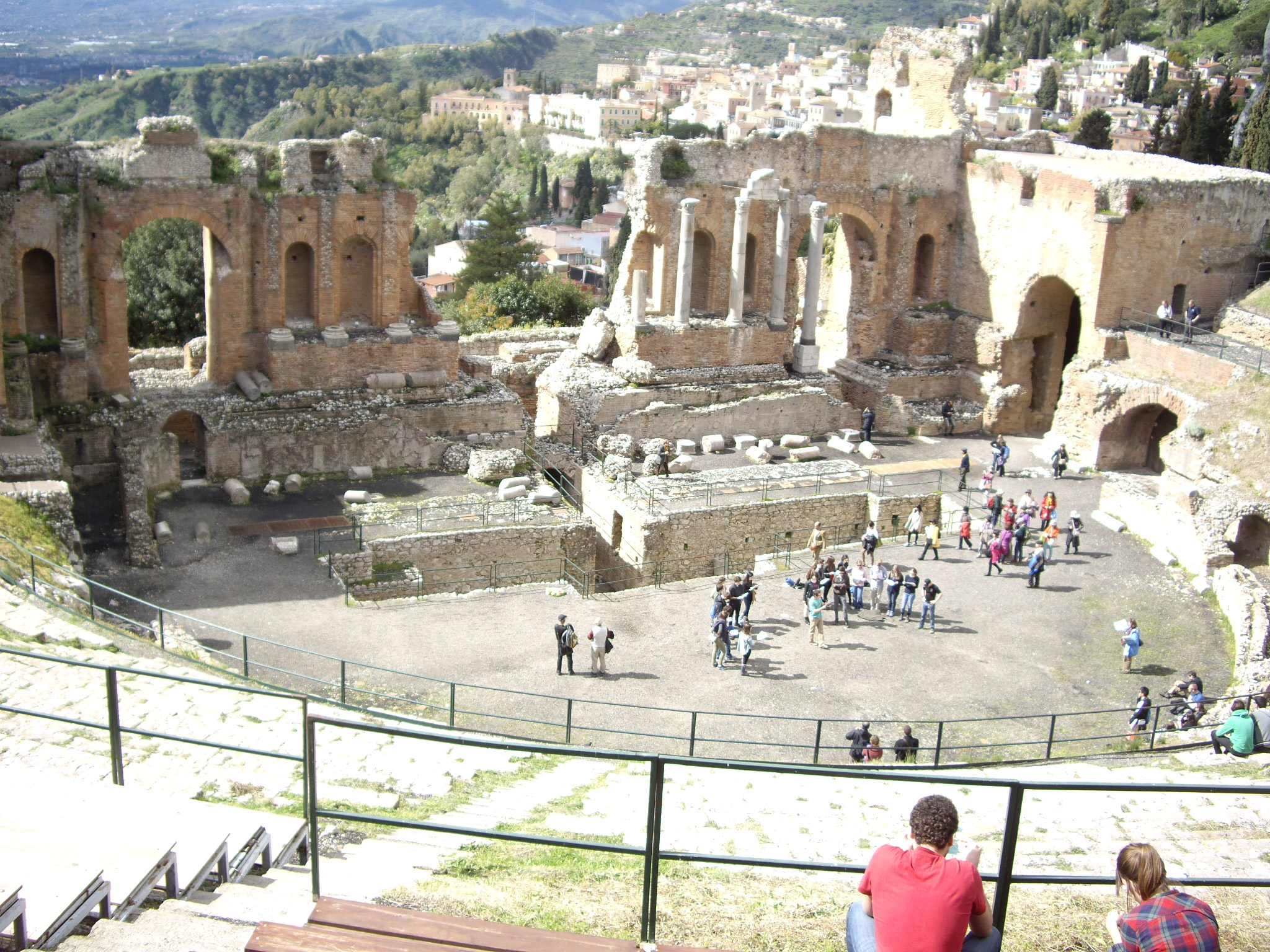 Teatroko eszenatokia